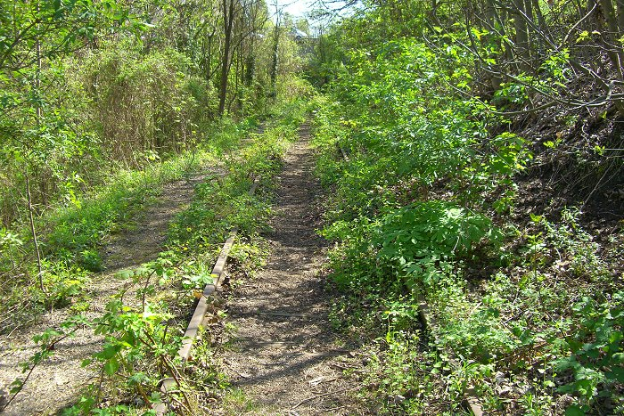 Gleisreste der Bahnstrecke Leipzig-Connewitz–Plagwitz